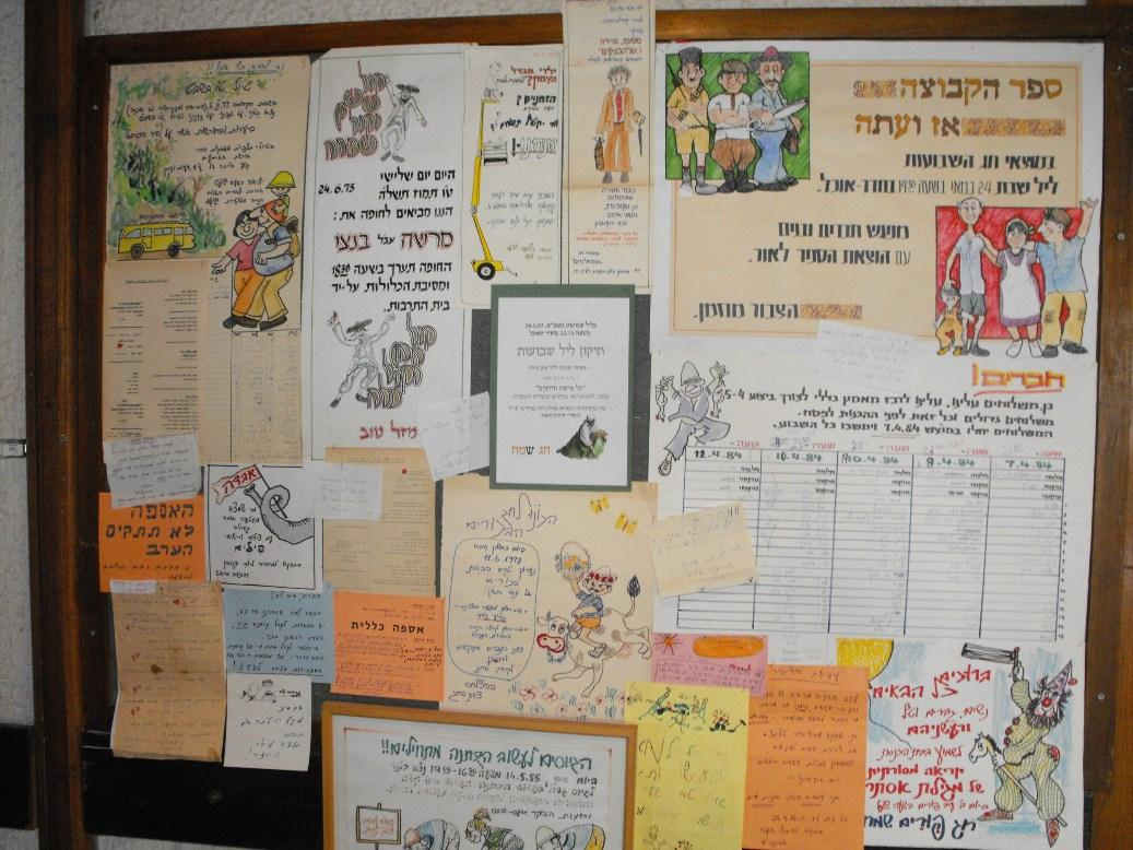 תערוכה: "זמן קיבוץ - חדר אוכל כמשל".